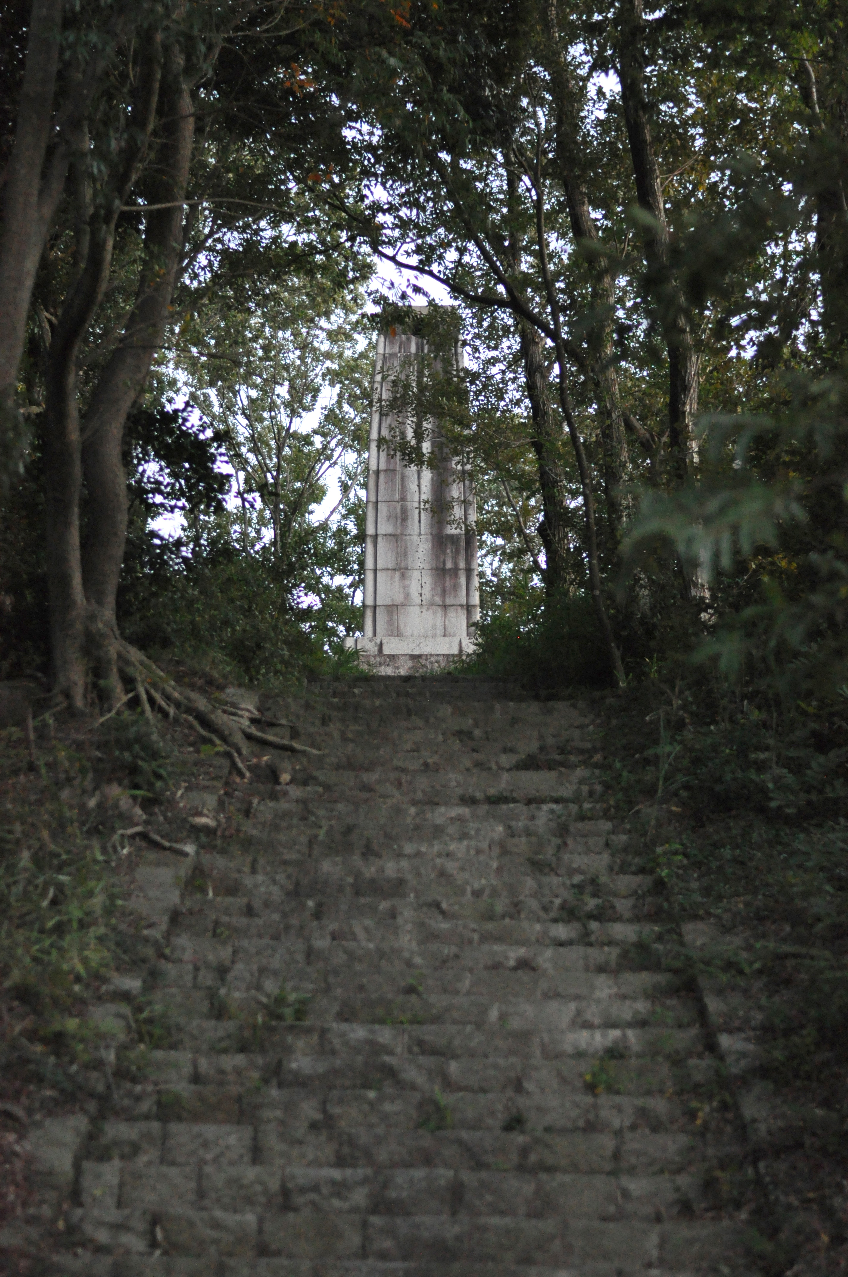 三重県伊勢市にある虎尾山